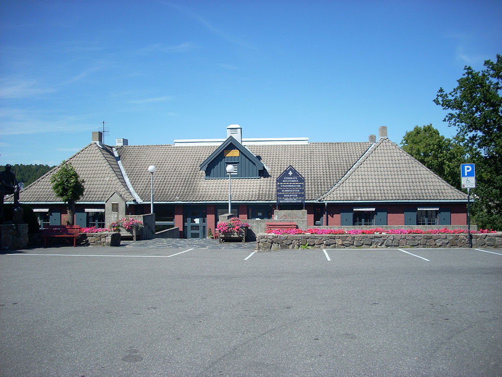 Eydehavn kulturhus, Eydehavn, Arendal kommune, Norge